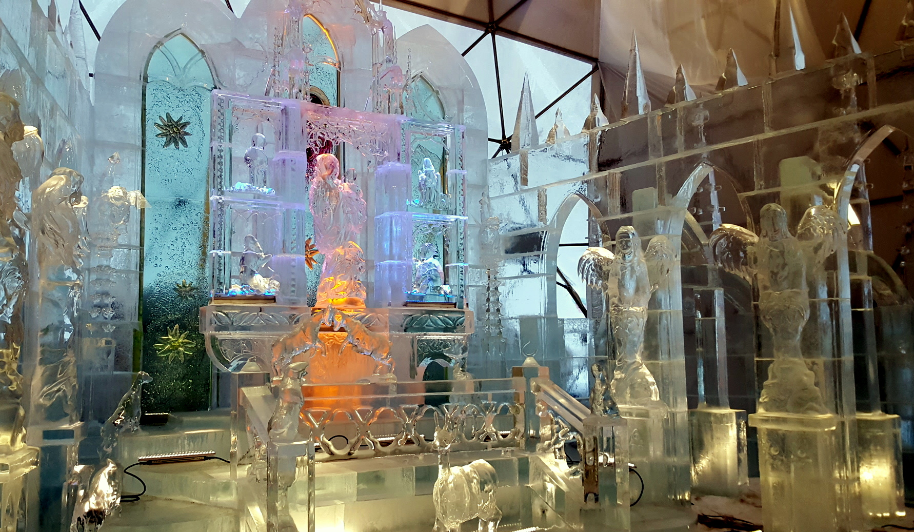 Tatranský dóm na Hrebienku. Interiér.